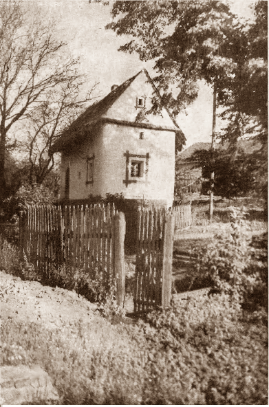 Geburtshaus von Johannes Reinelt in Kreuzendorf, Kreis Leobschütz